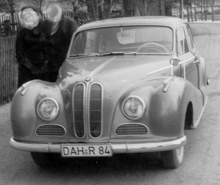 SW-Foto eines silbergrünmetallic BMW 501 mit 8 Zylinder V-Motor